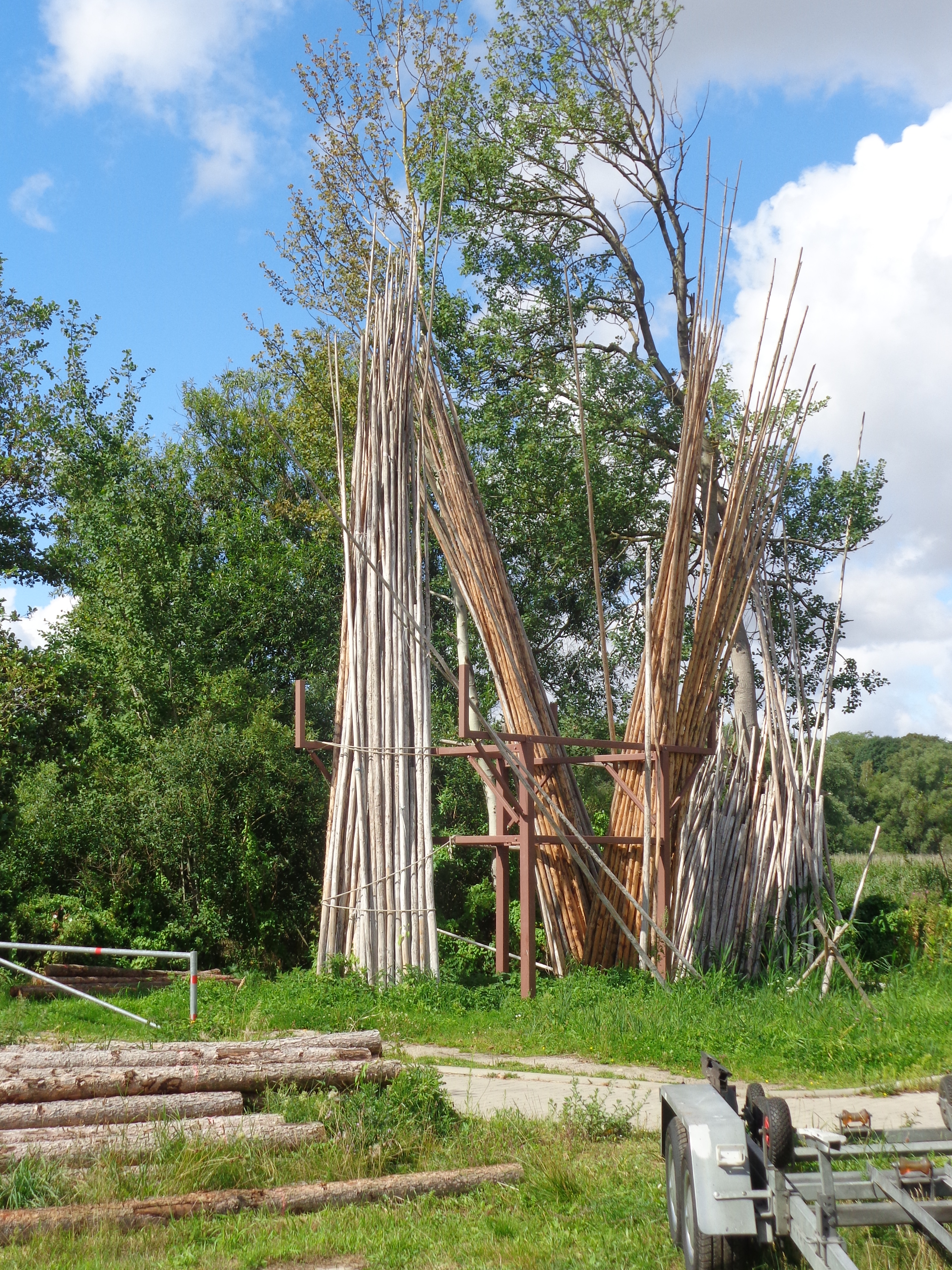 Reusenstangen an der Elde-Mündung in Plau am See